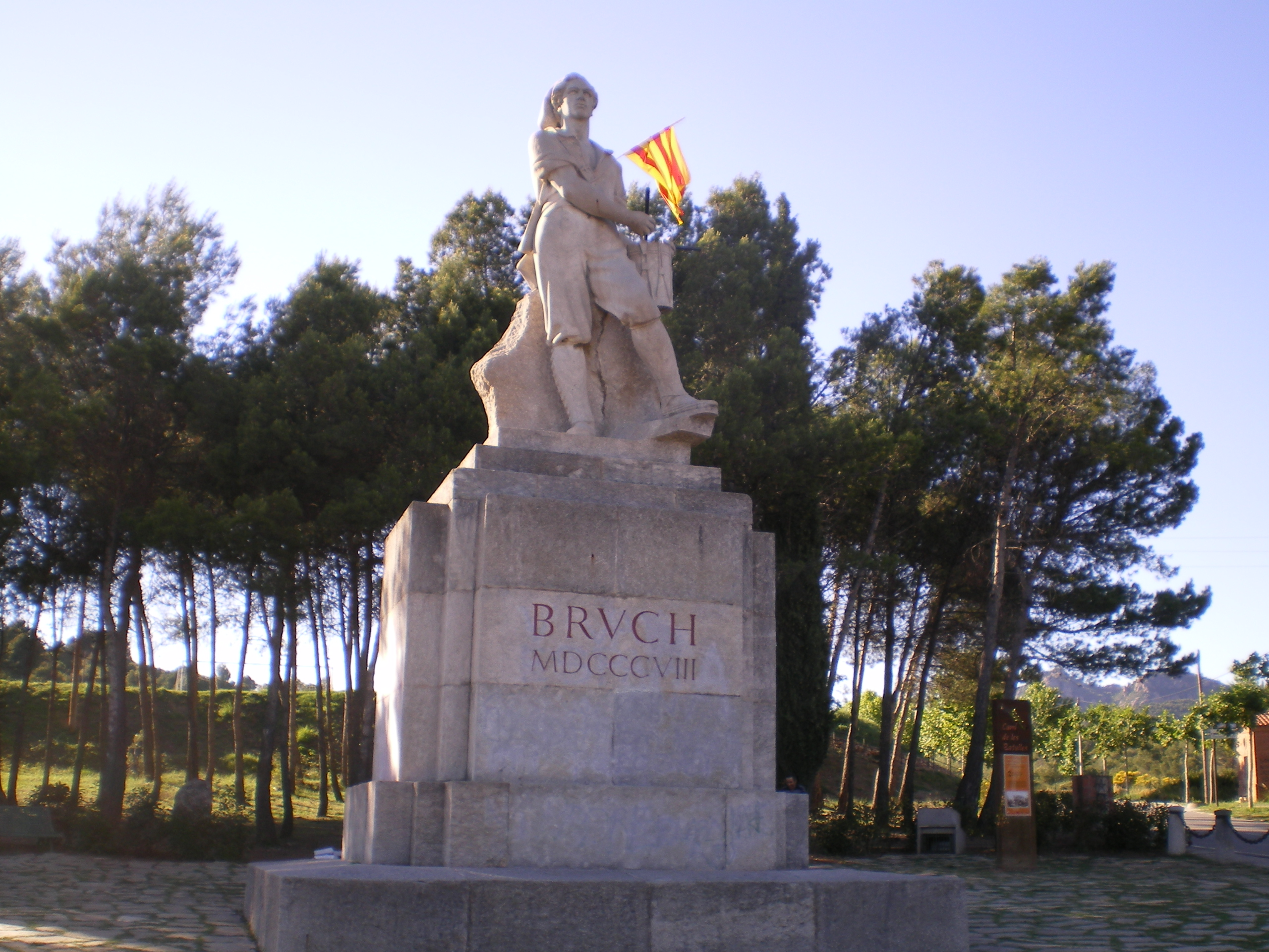 Monumento en memoria de las batallas ganadas a los franceses los días 6 y 14 de junio de 1808 durante la guerra de independencia española. El monumento recuerda la figura de Isidre Lluça i Casanoves, 'timbaler del sometent de Santpedor'